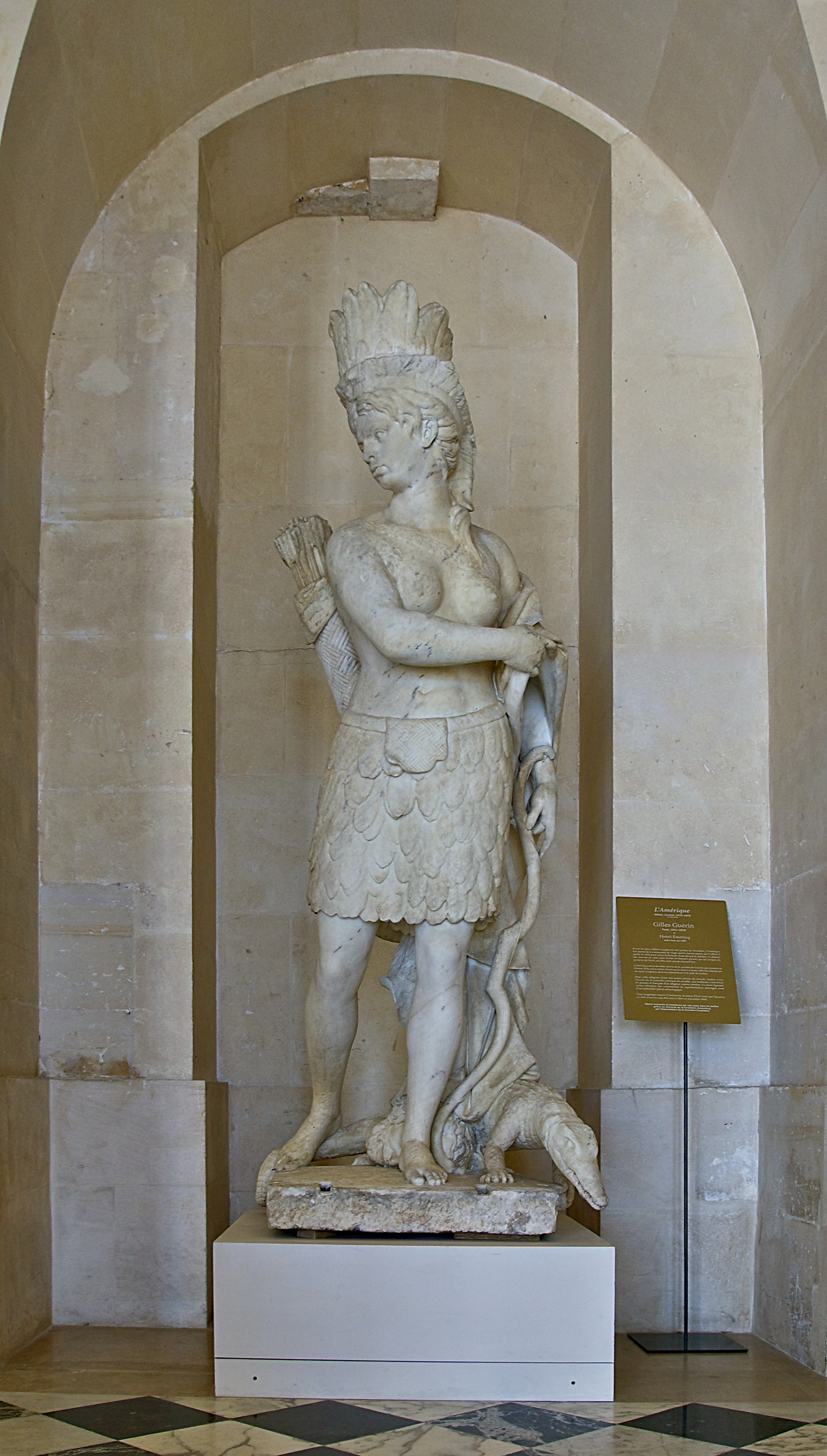 Une indienne, couronnée de plumes et flanquée d'un alligator comme attribut.